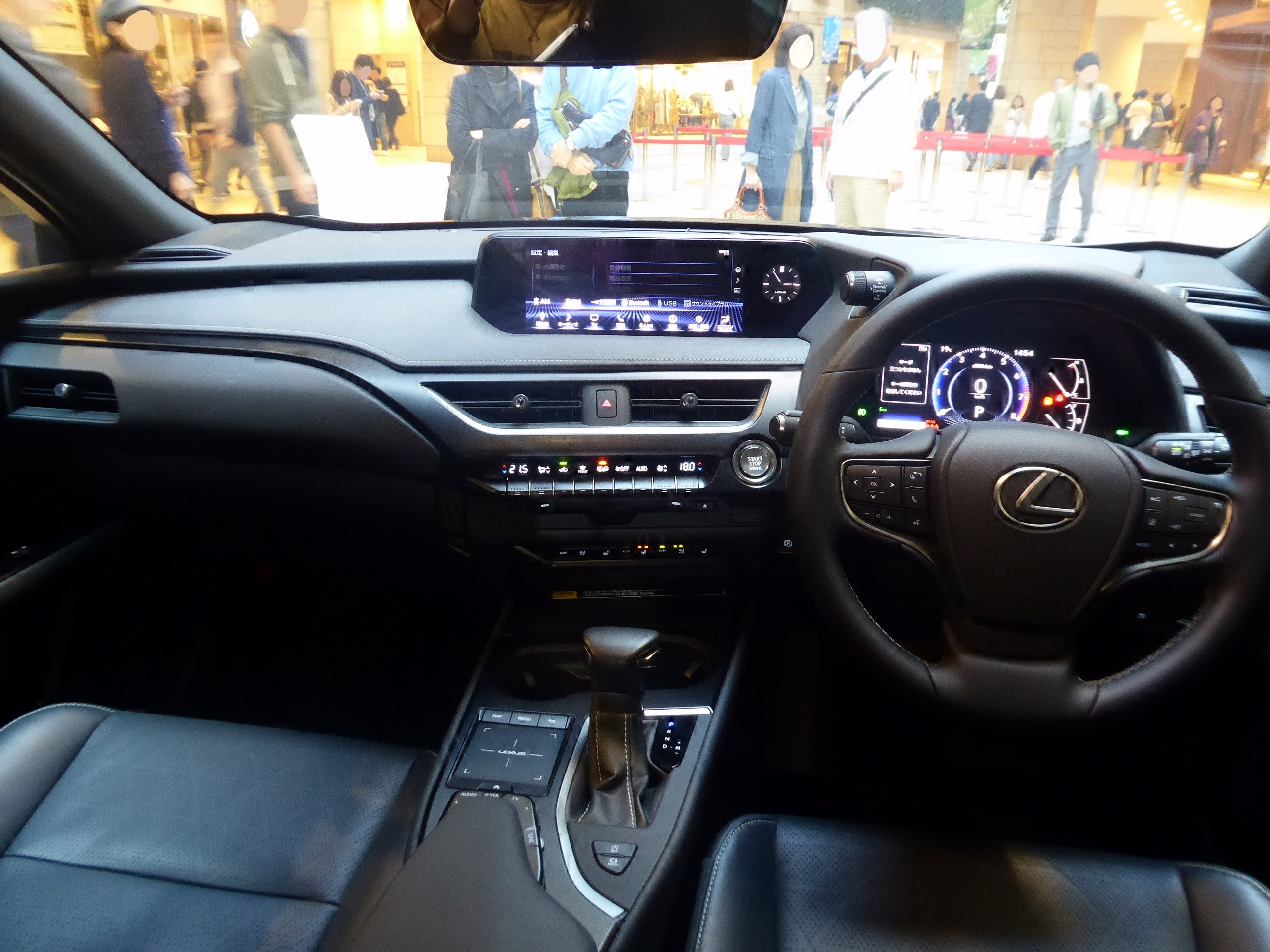 レクサス・UX200の初代モデルプロトタイプのインテリアを撮影。